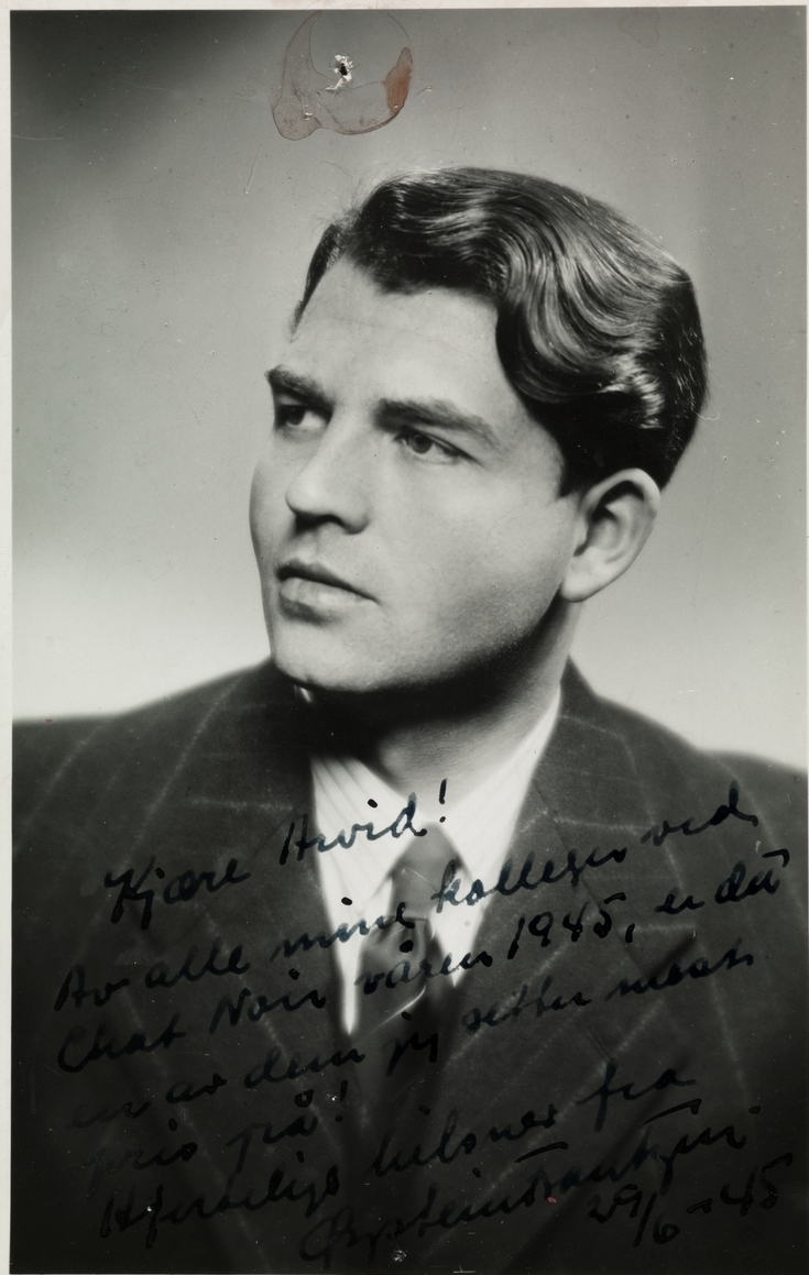 Depicted person: Øystein Frantzen Påskrift: "Kjære Arvid! Av alle mine kolleger ved Chat Noir våren 1945, er du en av dem jeg setter mest pris på! Hjertelige hilsener fra Øystein Frantzen 29/6 -45."